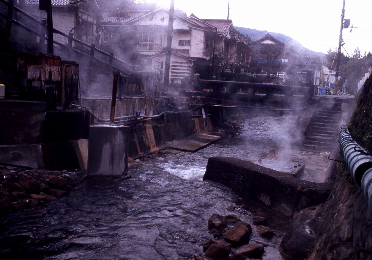 湯の峰温泉湯筒 上流側より見る